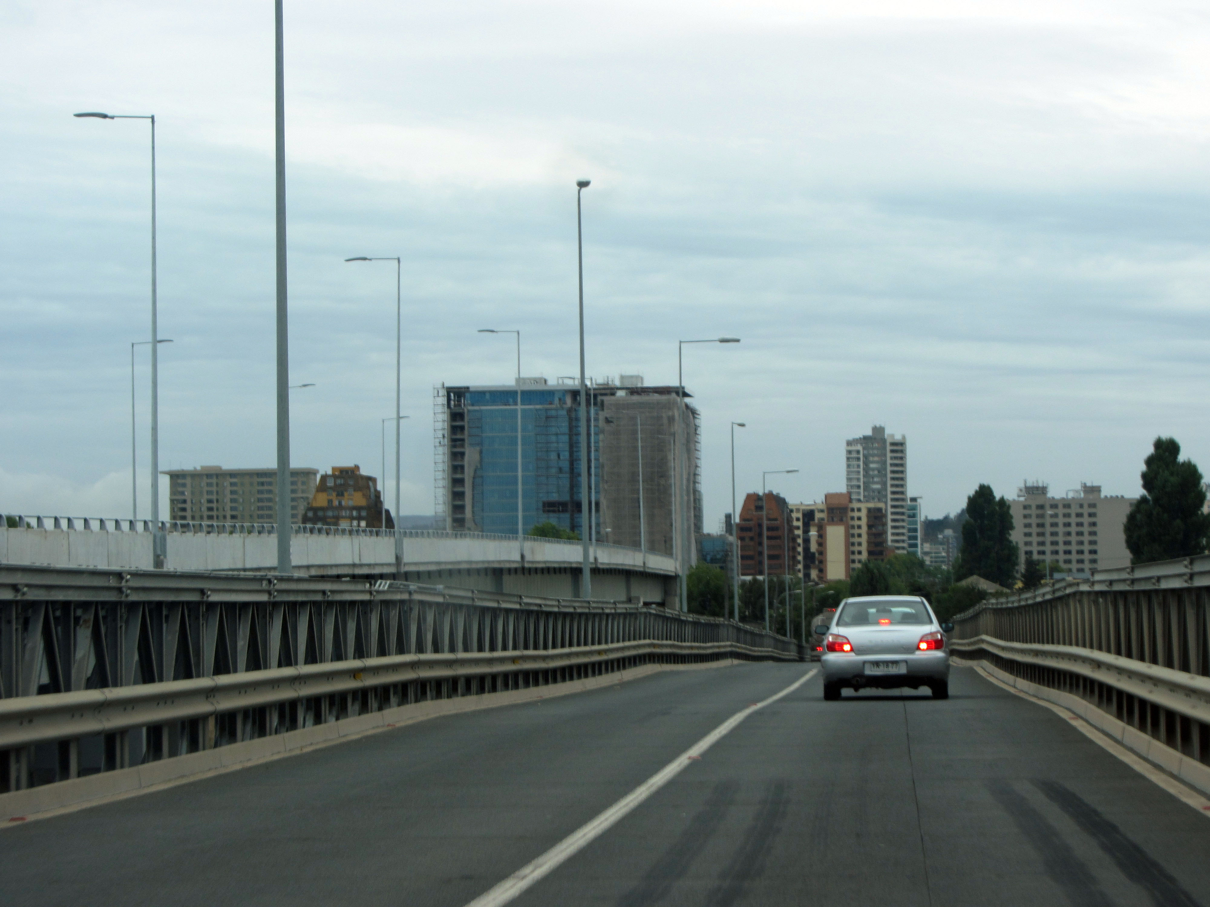 Puente mecano en Concepción, Chile, construido mientras se termina el Puente Chacabuco